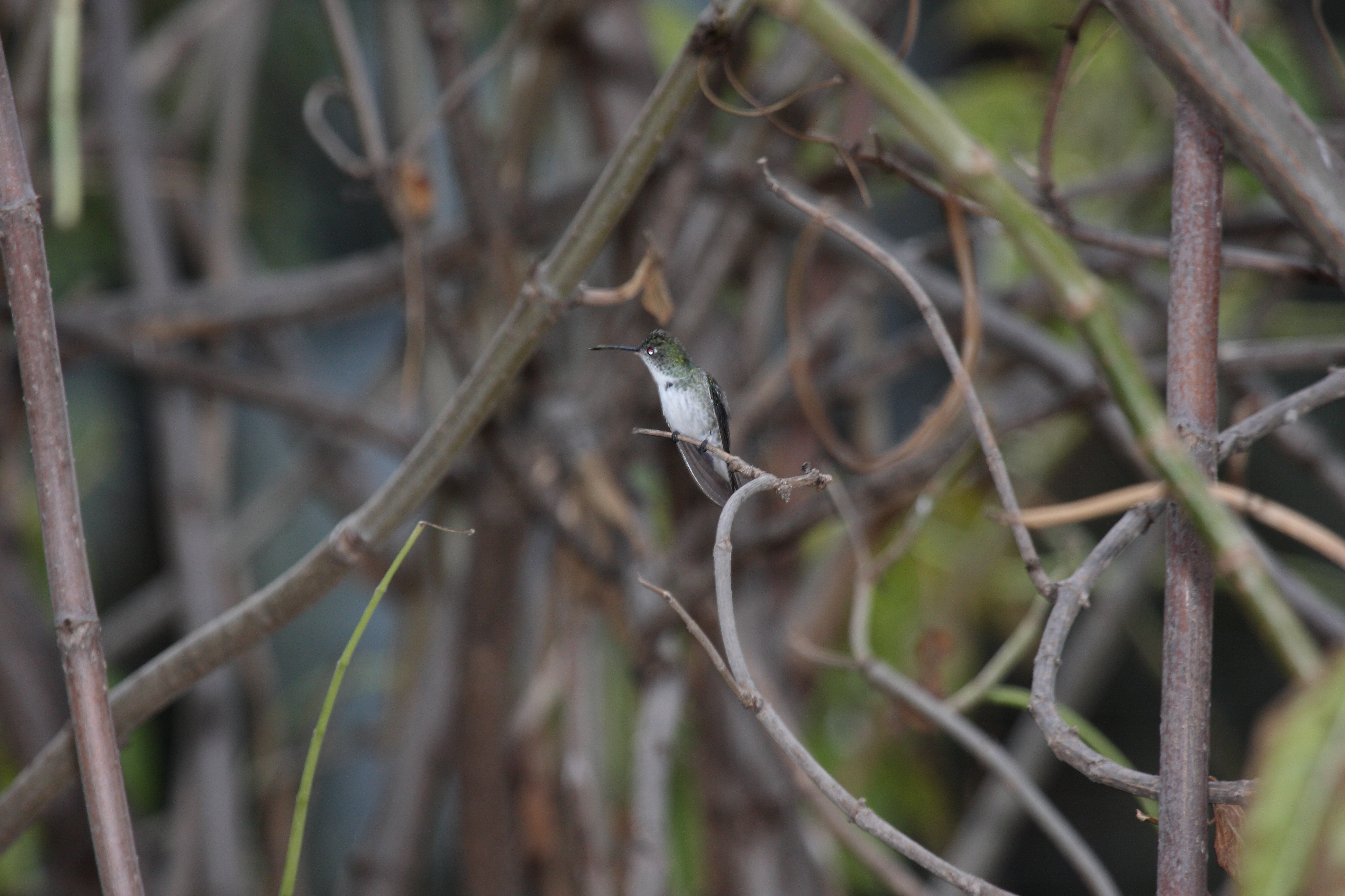 White-bellied Hummingbird in Peru